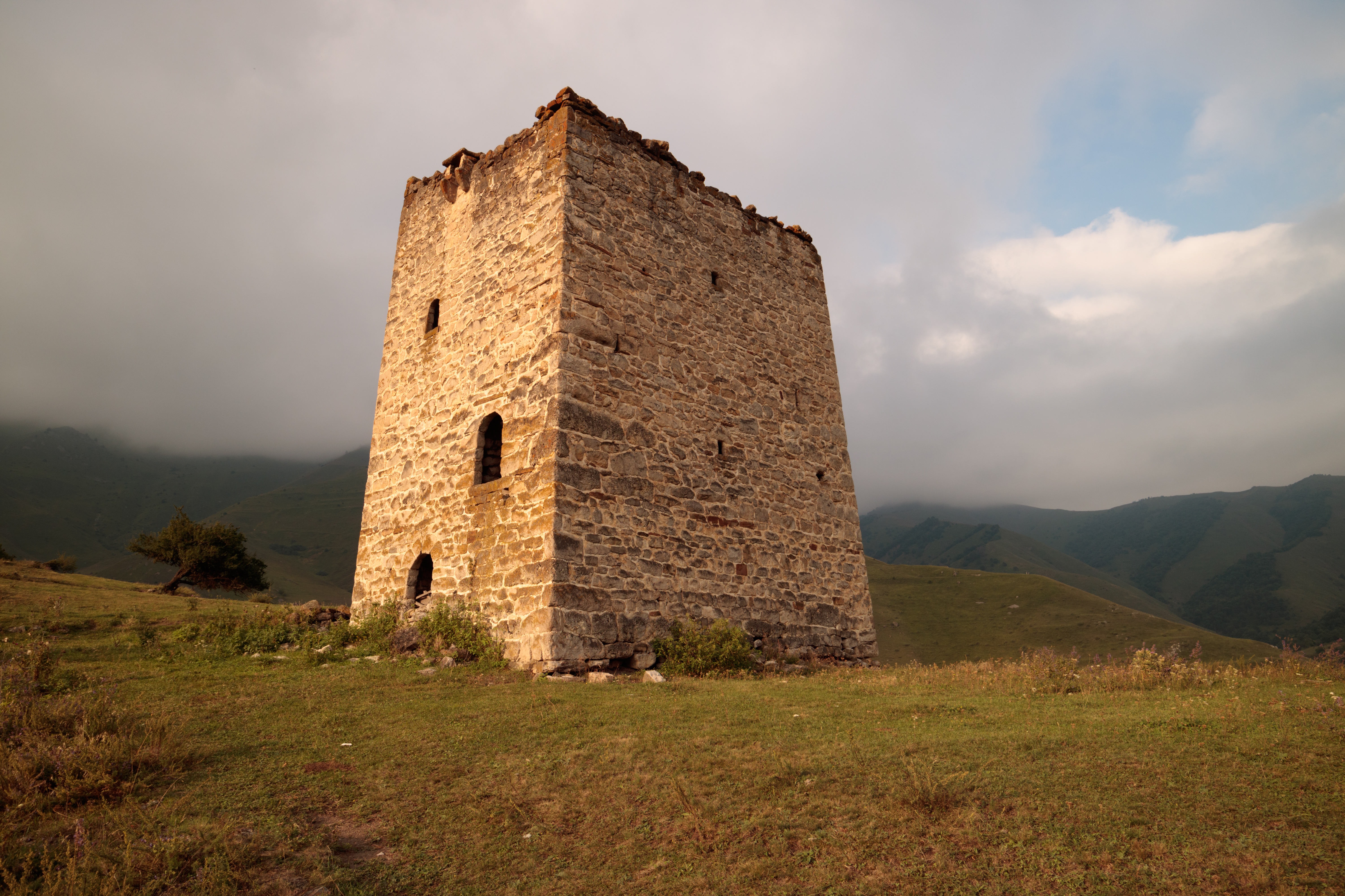 Заповедник «Эрзи»: на северном макросклоне Большого Кавказа, в Джейрахско-Ассинской котловине и прилегающих к ней с севера горах Скалистого хребта, на территории двух районов: Джейрахского и Сунженского, Джейрахский район, Ингушетия This image is related to the protected area of Russia number 0600002